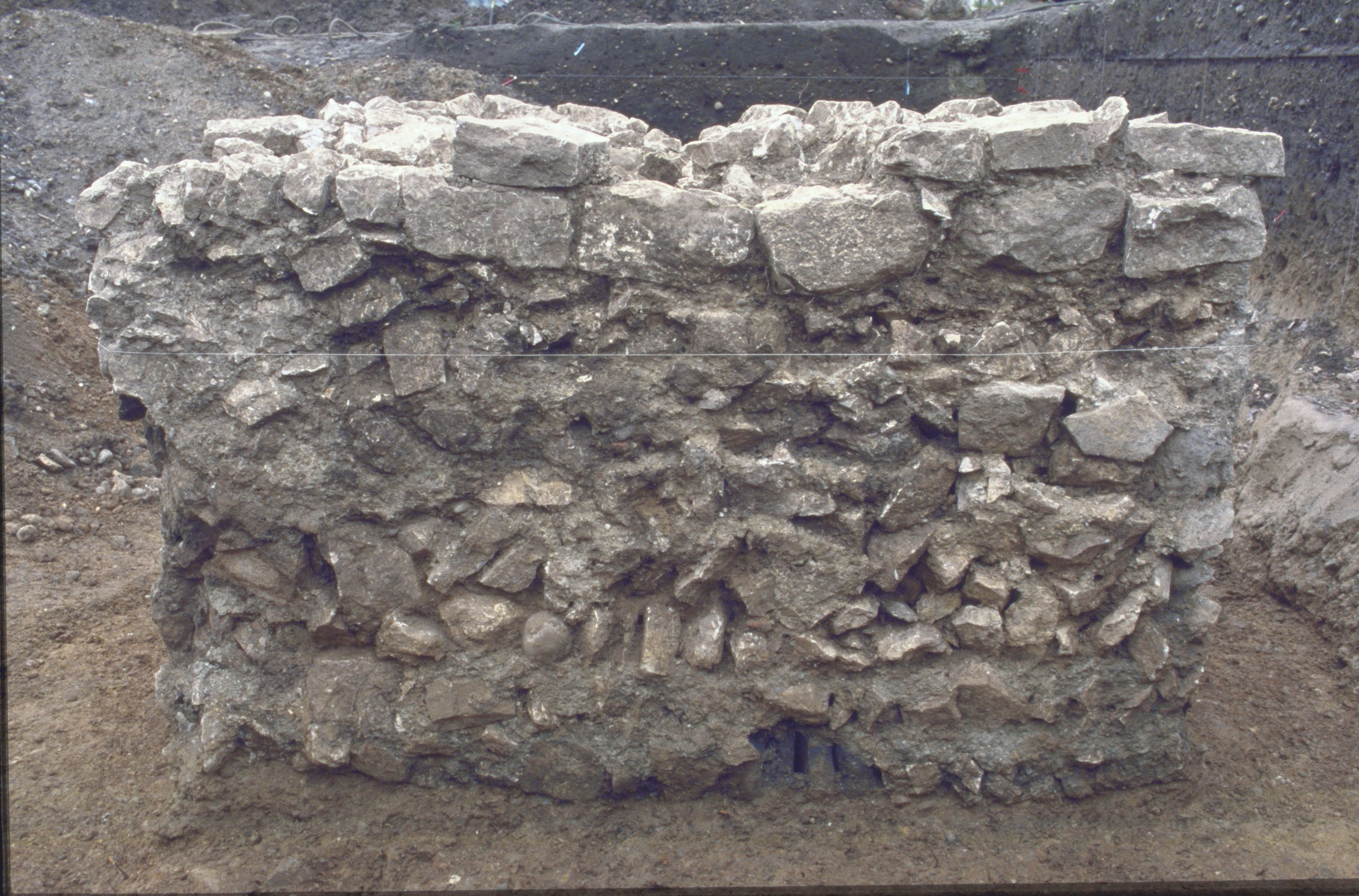 Ausgrabungen der Kantonsarchäologie Aargau Objekt: Aquaeduktbrücke von Vindonissa Ort: Windisch, Dorfzentrum Datierung: 1. Jh. n. Chr. Aufnahmedatum: 2011 Anlass der Grabung: Im Vorfeld eines grossen Bauprojektes im Dorfzentrum von Windisch hat die Kantonsarchäologie Aargau von Juli 2011 bis August 2012 ein rund 4400 m*2 grosses Areal zwischen der heutigen Zürcher-, Dohlenzelg- und Hauserstrasse ausgegraben. Wie aufgrund von früheren Grabungen zu erwarten, tangierte die Grabung eine Nord-Süd verlaufende Aqueadukt-Brücke. Beschreibung: Es konnten insgesamt zehn Pfeilerfundamente der Aquaeduktbrücke nachgewiesen werden. Es handelt sich um durchschnittlich 2,1 x 2,1 m messende und maximal 1,6 m hoch erhaltene Bruchsteinfundamente. Zwischen den Fundamenten ist jeweils eine Pfeilerbreite (2,1-2,5 m) ausgespart. Die Fundamente bestehen aus lageweise eingebrachten, im Mittel rund 0,25 m langen Kalkbruchsteinen (Muschelkalke und Dolomite). Dabei sind die Bruchsteine direkt gegen die senkrechte Baugrubenwand gesetzt. An den gut erhaltenen Fundamenten lassen sich 8 bis 10 Steinlagen erkennen. Im vorliegenden Fall lässt sich aufgrund der guten Erhaltung der obersten Lage zudem eine Veränderung erkennen: Auf eine Lage aus grob zugehauenen Muschalkalkquadewrn folgen plattige Kalksteine. Hier dürfte der Fundamentabsatz gelegen haben. Literatur: Matthias Flück: "… es blieb somit nur noch der Vermutung Raum, der Sockel habe ein grosses Standbild getragen": Vorbericht zur Ausbrabung Windisch-Dorfzentrum 2011-2012 (V.011.1). In: Jahresbericht / Gesellschaft Pro Vindonissa, 2012, S. 57-80.